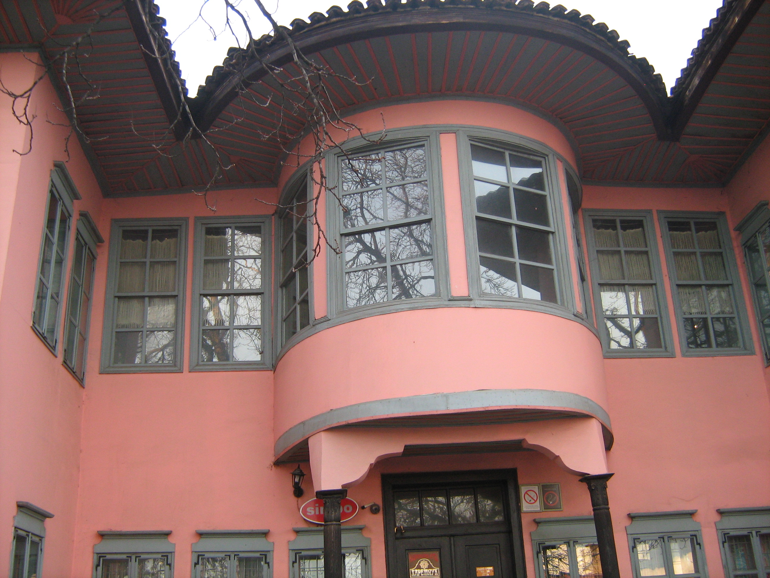 Пашин конак Врање, харемлук